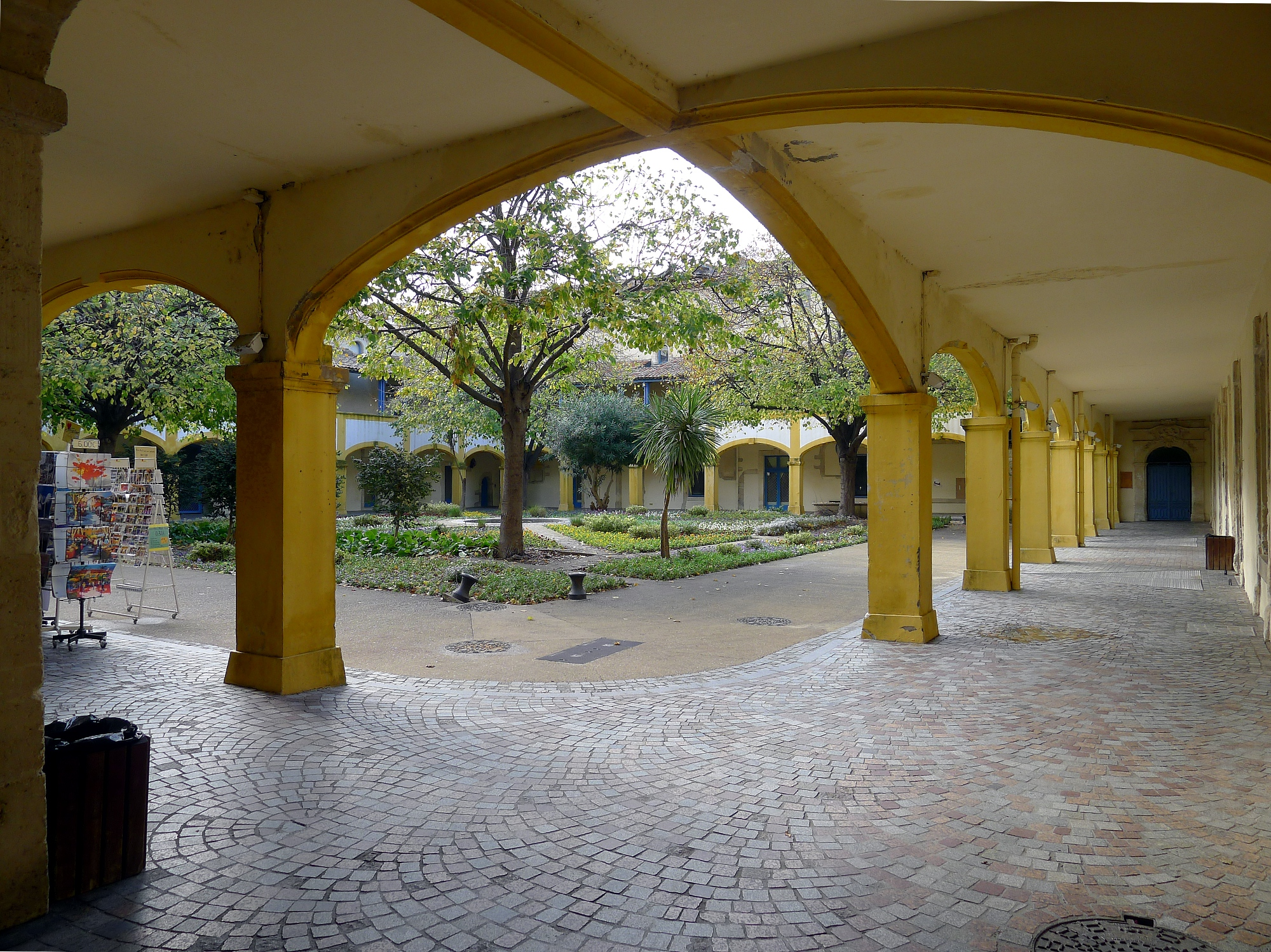 Espace van Gogh (ancien Hôtel-Dieu) - Arles (Bouches-du-Rhône, France)